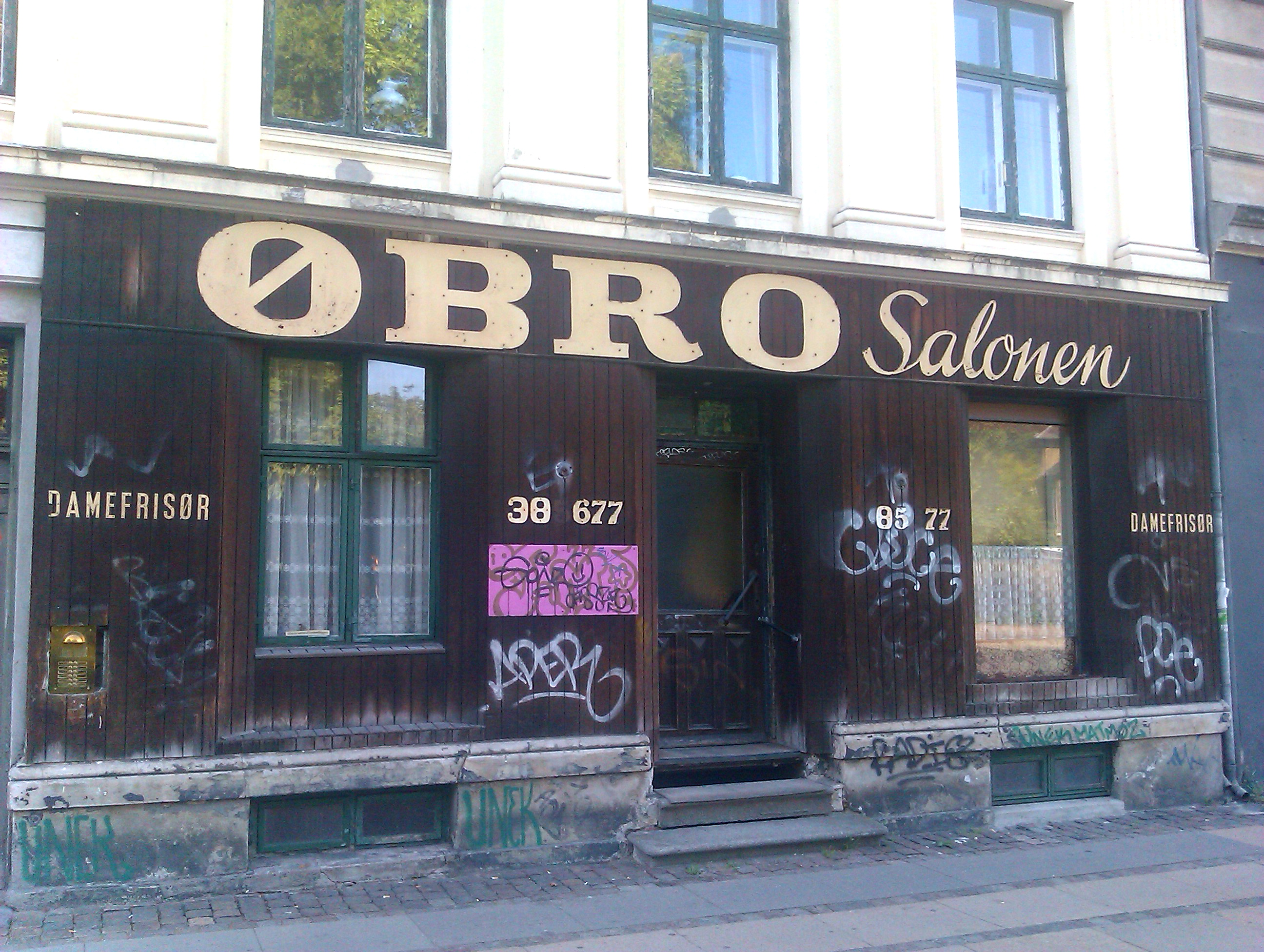 ØBRO Salonen, Øster Farimagsgade, København